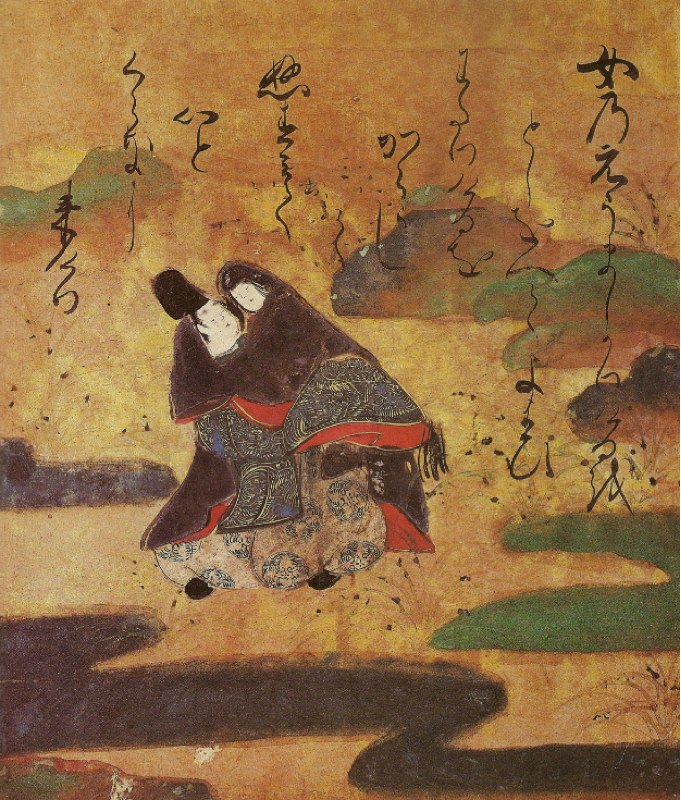 Scène de l'Ise-monogatari, encre et couleurs sur papier, (21,1x24,7 centimètres), par le peintre japonais Nonomura Sōtatsu des XVIe et XVIIe siècle. Conservée au Musée Yamato Bunkakan de Nara.